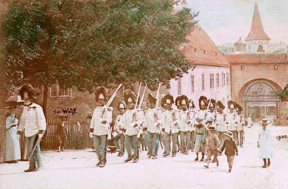 Schwarzenberská granátnická garda 4